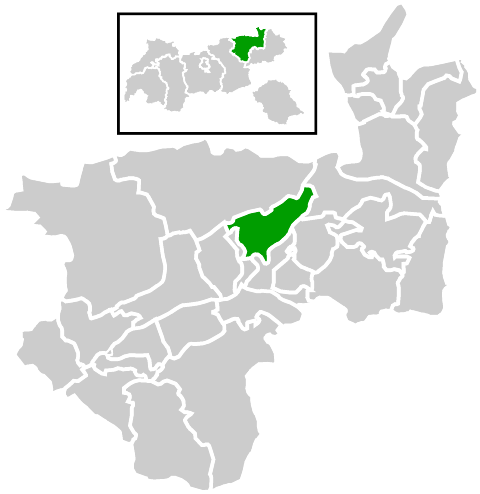 Lage der Gemeinde innerhalb des Bezirks Kufstein